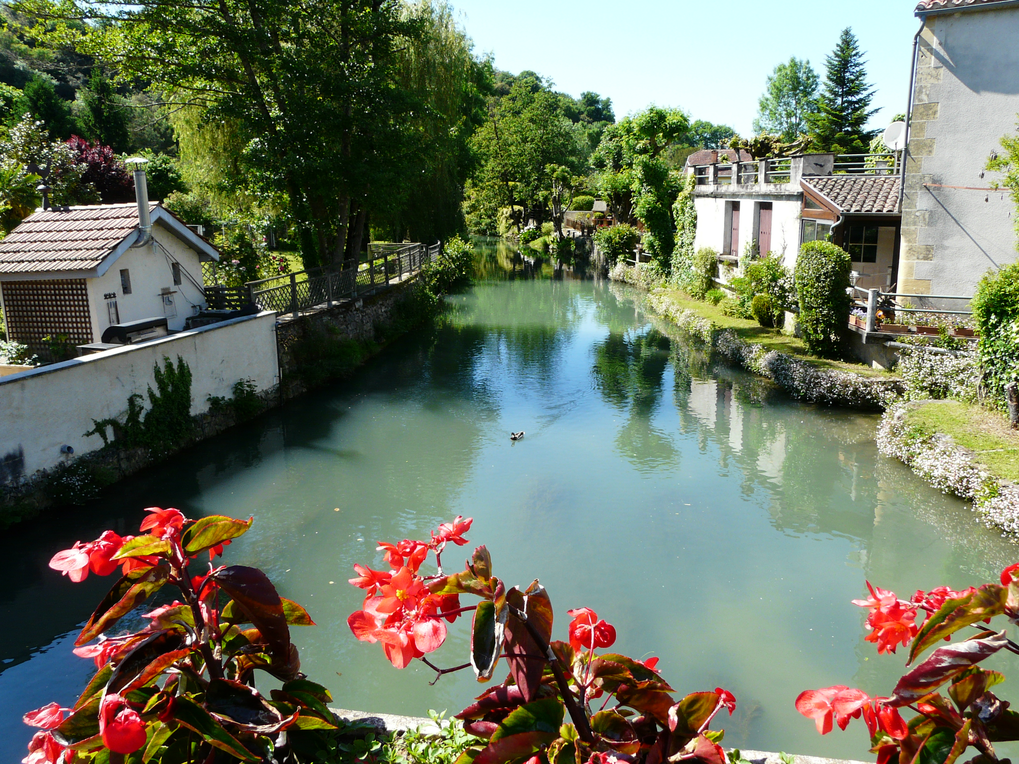 La Couze en aval du pont de la route départementale 37, Couze-et-Saint-Front, Dordogne, France.